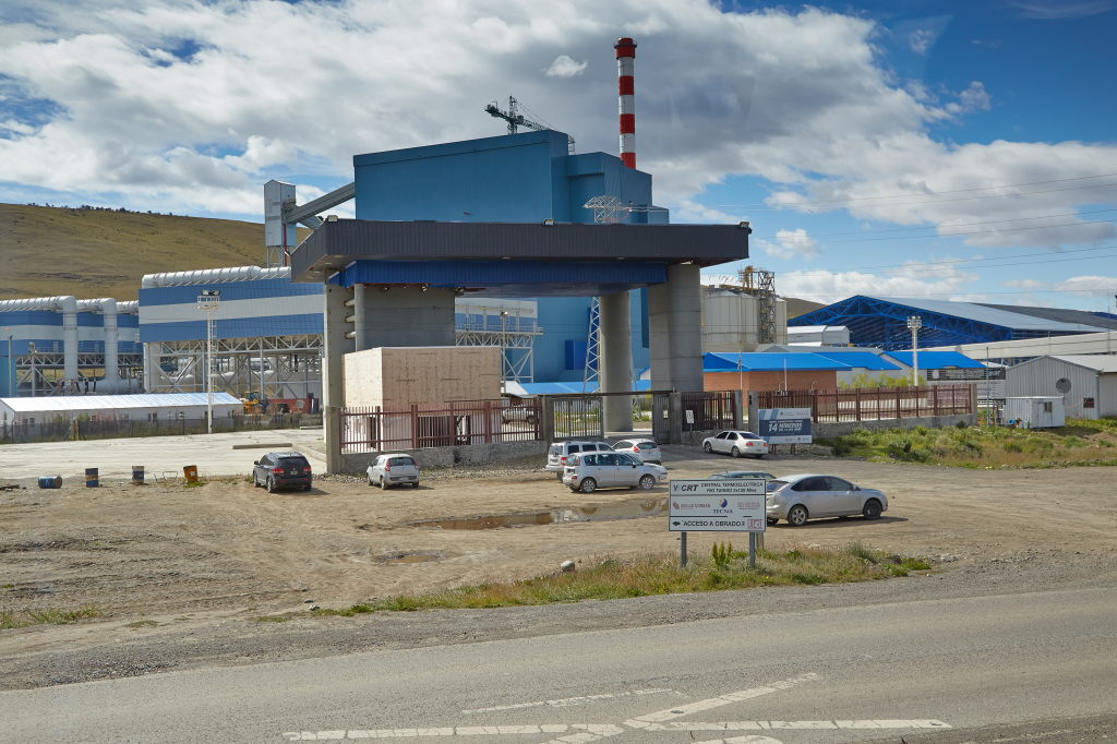 Río Turbio